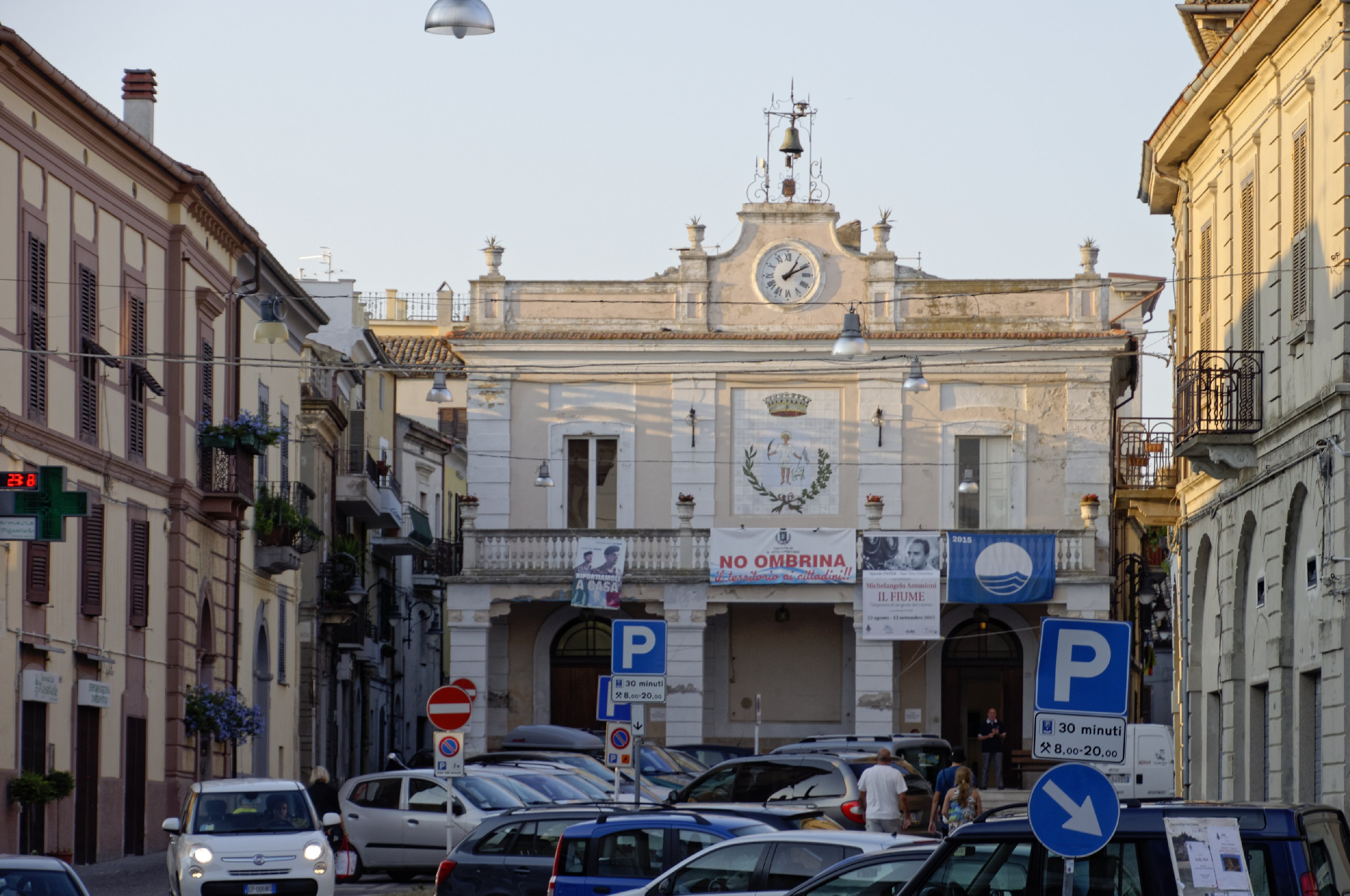 San Vito Chietino 2015 Dieses Foto entstand in Zusammenarbeit mit Stadtbesichtigungen.de Die Seiten Stadtbesichtigungen.de, der dazugehörige Reise Blog sowie die Facebookseite: Stadtbesichtigungen Rom dürfen dieses Bild für Ihre Veröffentlichungen ohne den Hinweis auf Wikipedia, Commons bzw der Lizenz verwenden. Die Verantwortlichen habe von mir (Ra Boe) die Originaldaten zur freien Verfügung übermittelt bekommen.